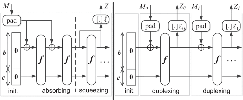 Sponge функция